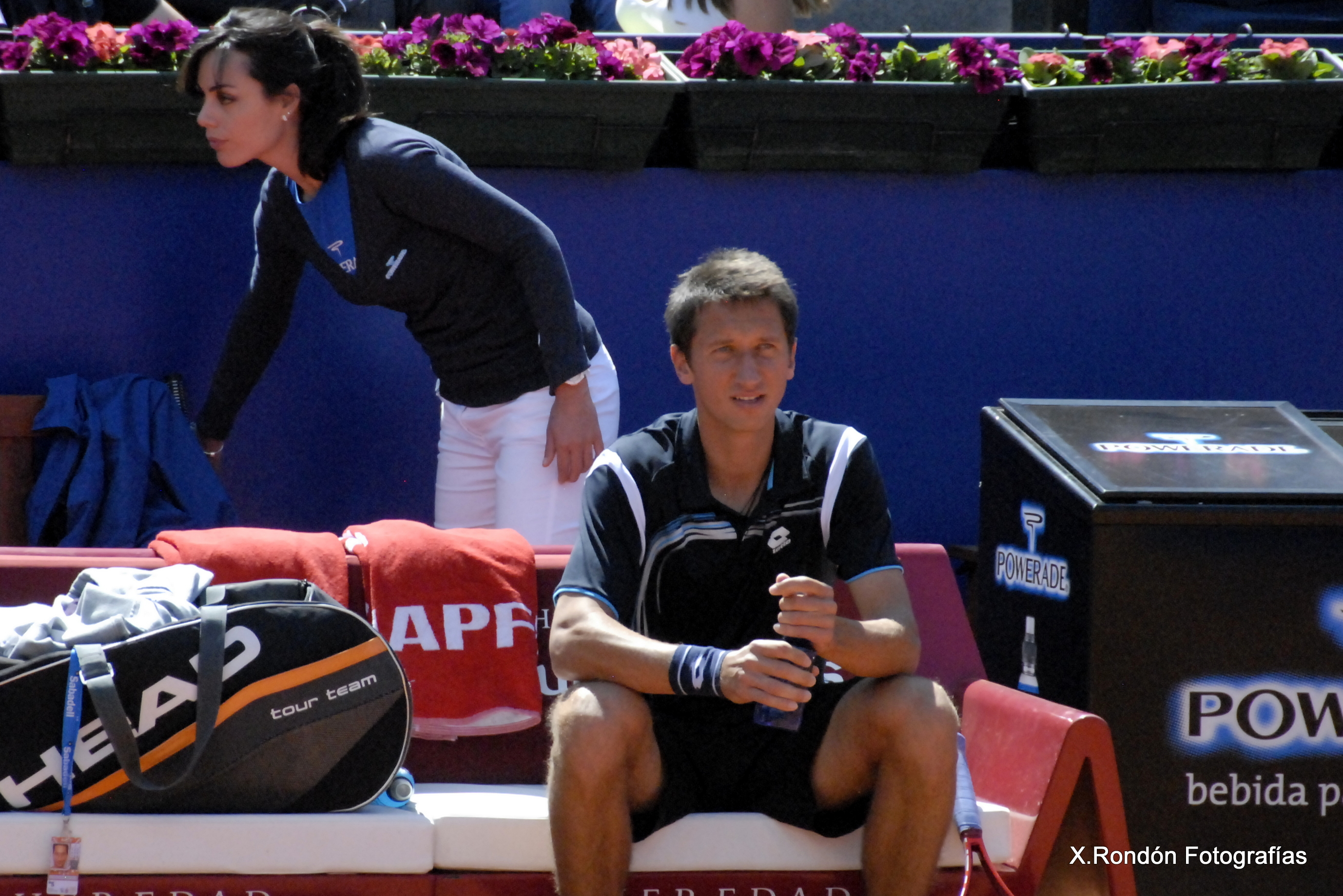 El tenista ucraniano Sergiy Stakhovsky en el Trofeo Conde de Godó 2012